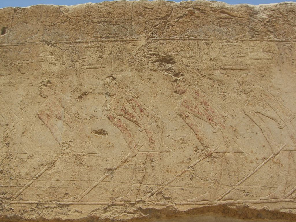 Relief de la chaussée d'Ounas représentant le défilé des fonctionnaires du roi - Saqqarah - Ve dynastie